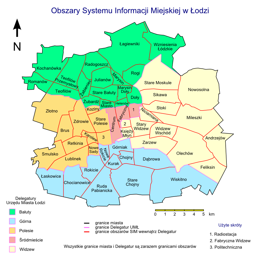 Obszary Systemu Informacji Miejskiej w Łodzi (wersja pliku w formacie png)